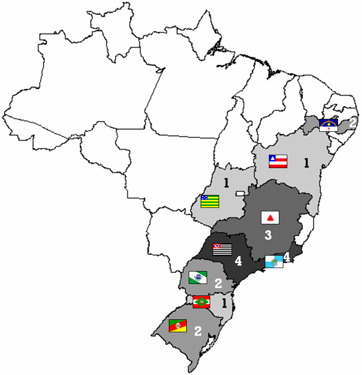 Mapa com a quantidade de times que cada estado brasileiro tem na Série A 2008